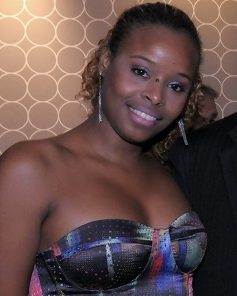 Eike Bastista e as atrizes Roberta Rodrigues e Cintia Rosa.